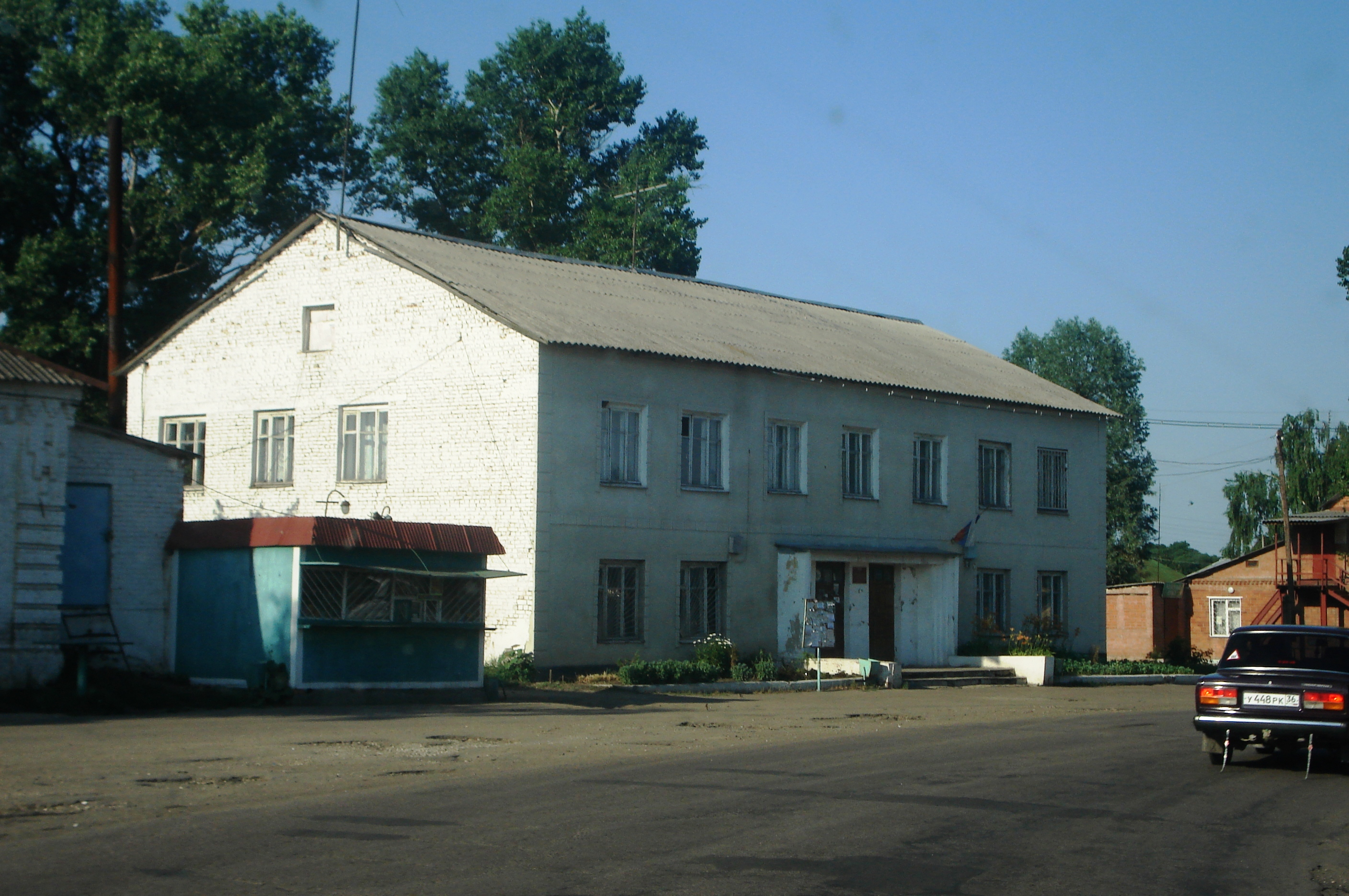 Здание сельсовета в Орлово